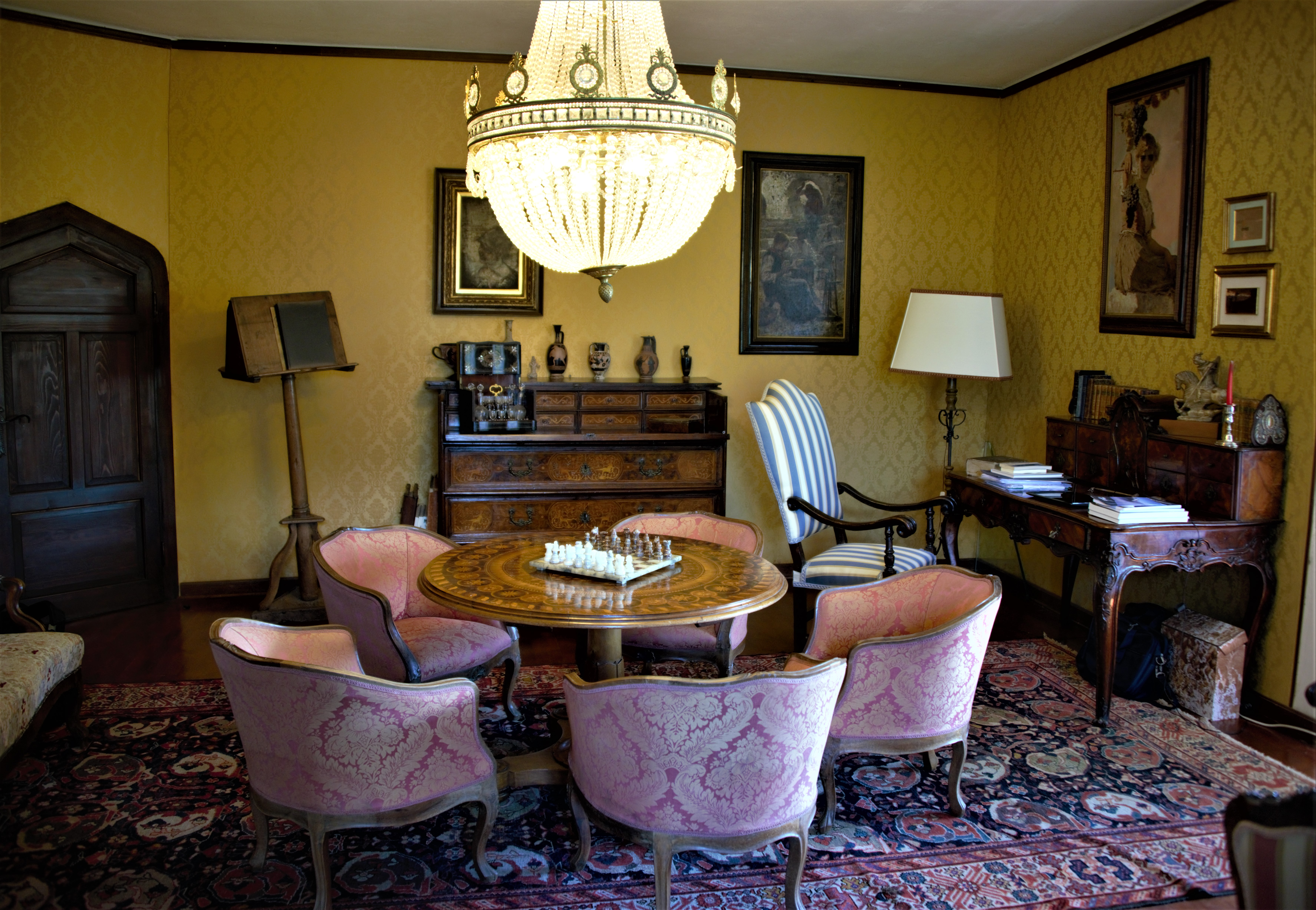 Castel Ivano This is a photo of a monument which is part of cultural heritage of Italy.